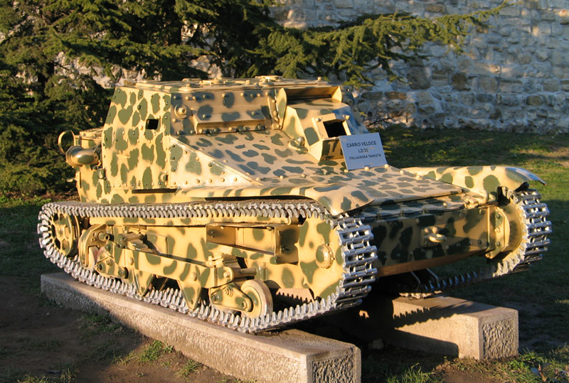 Italian tankette L3/35, Belgrade Military Museum, Serbia.